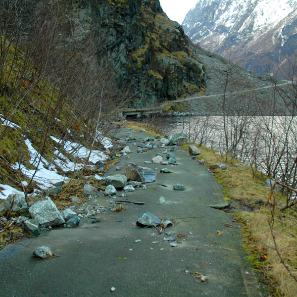 Gamle fylkesveg 241 i Sogn og Fjordane. I 200/01 vart det bygd tunnel på stekka fordi vegen var rasfårleg.